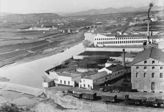 Manresa - Fàbrica del Panyos 1900